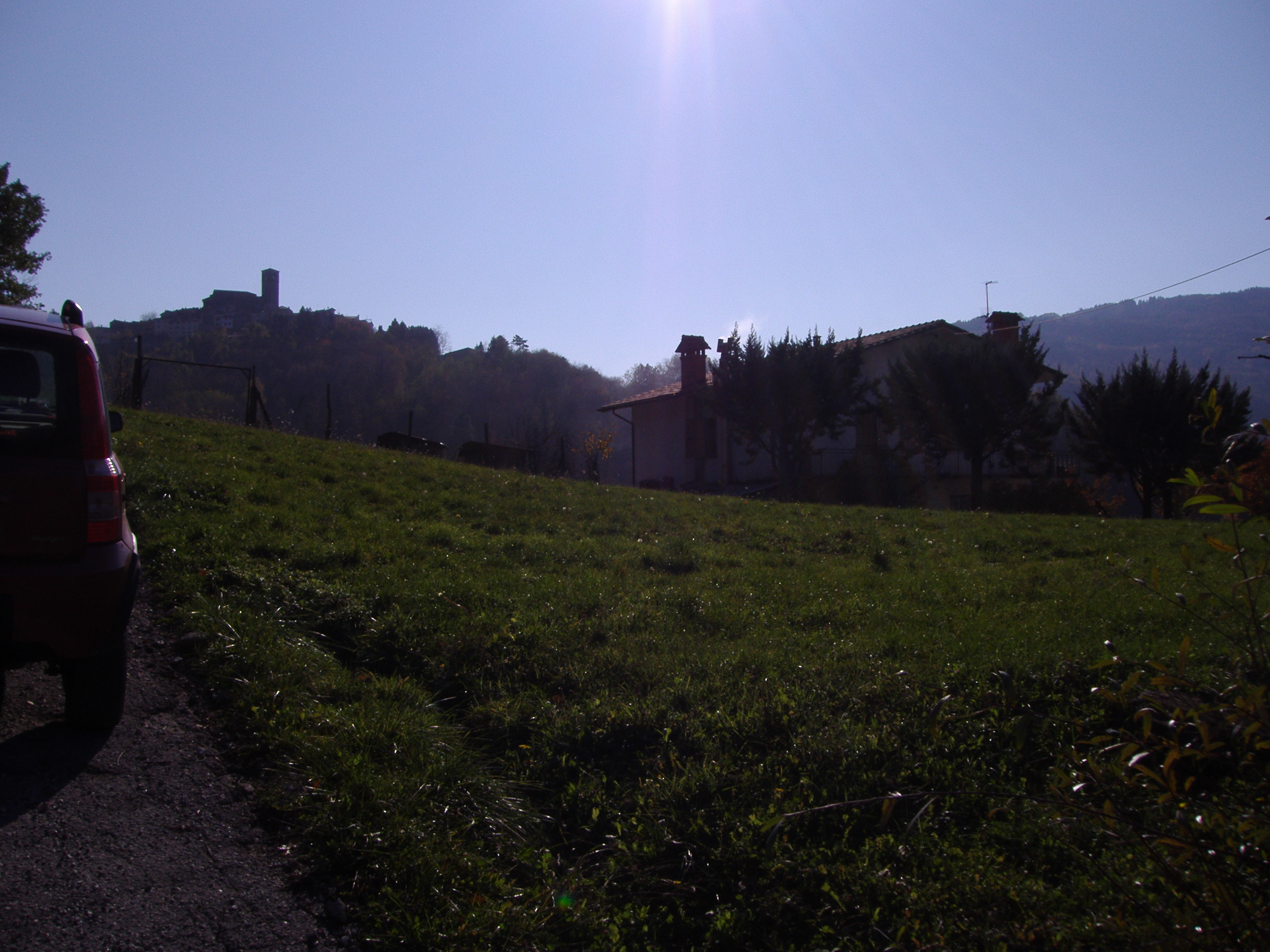 Panorama del paese di Piteglio da Lolle